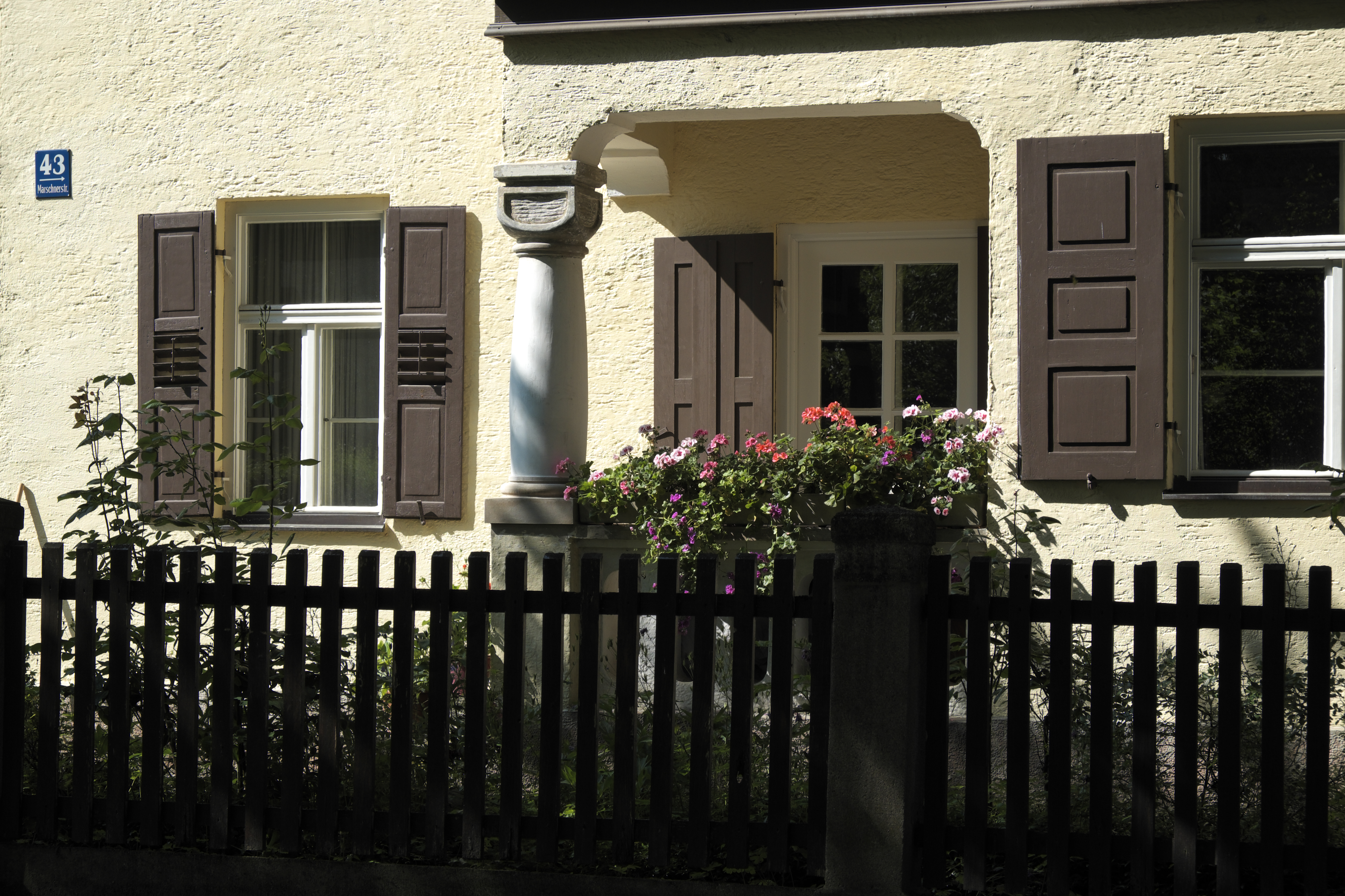 Wohnhaus in der Marschnerstraße 43 in Obermenzing im Stadtbezirk Pasing-Obermenzing in München (Bayern/Deutschland)